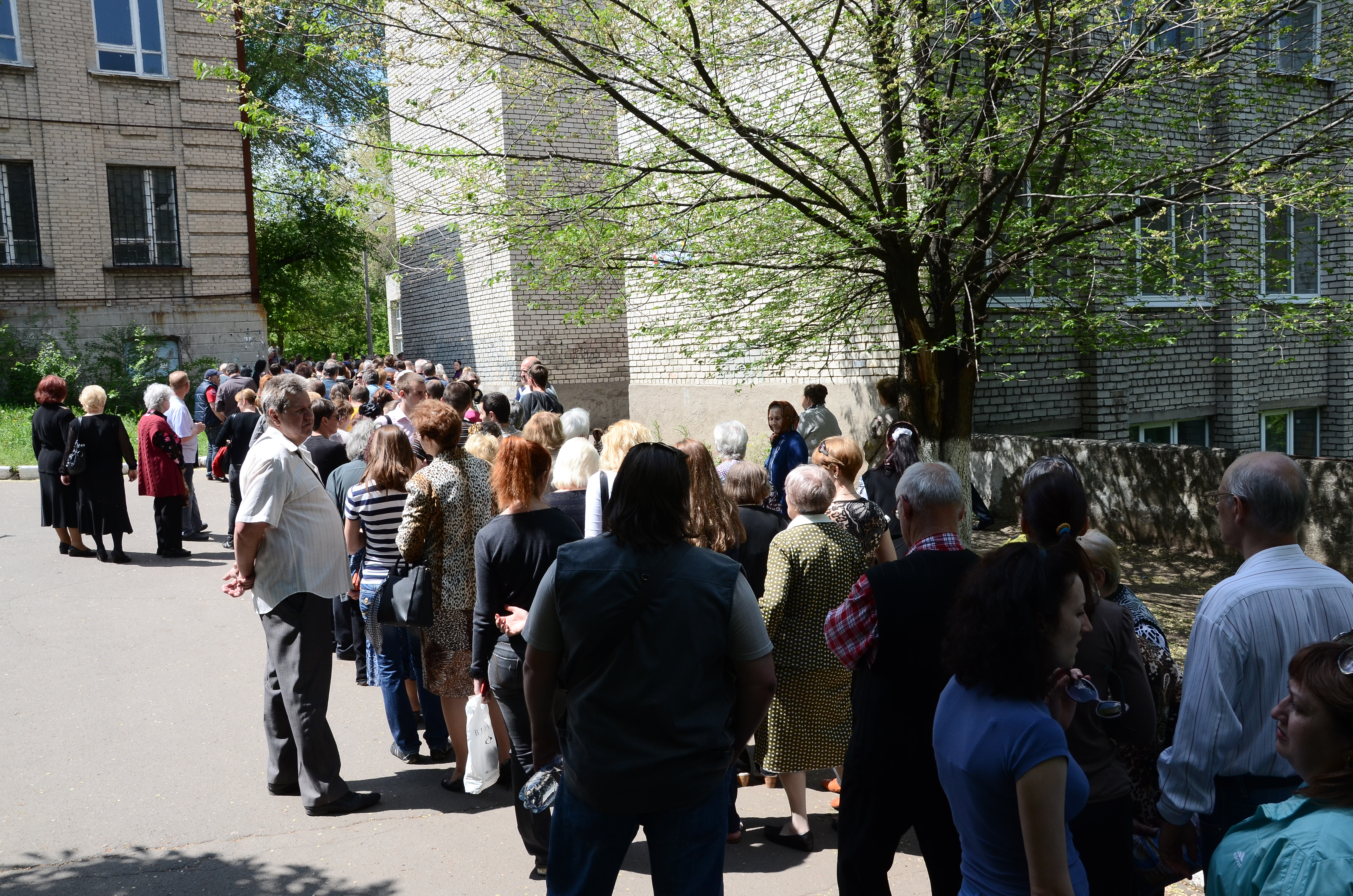 Референдум в Донецке